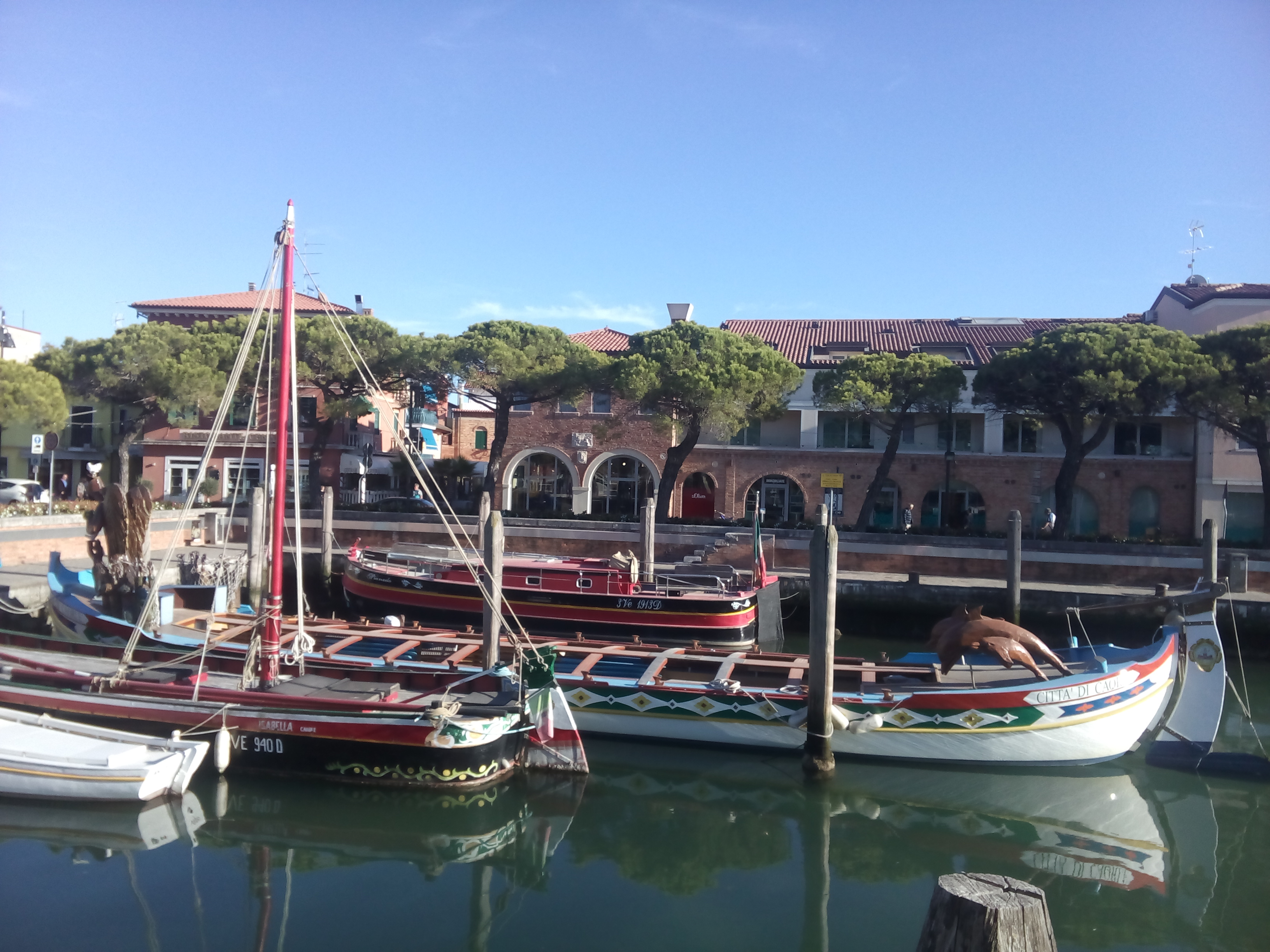 Caorle